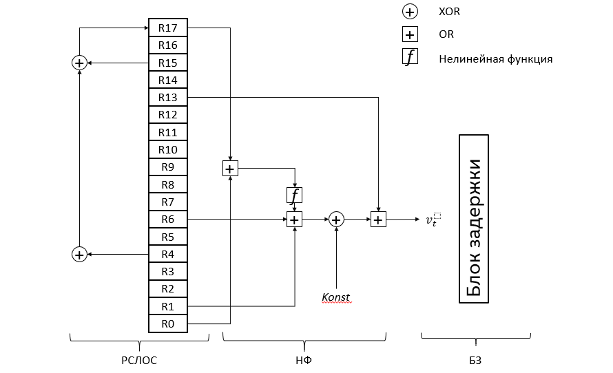 Схема SOBER-t32